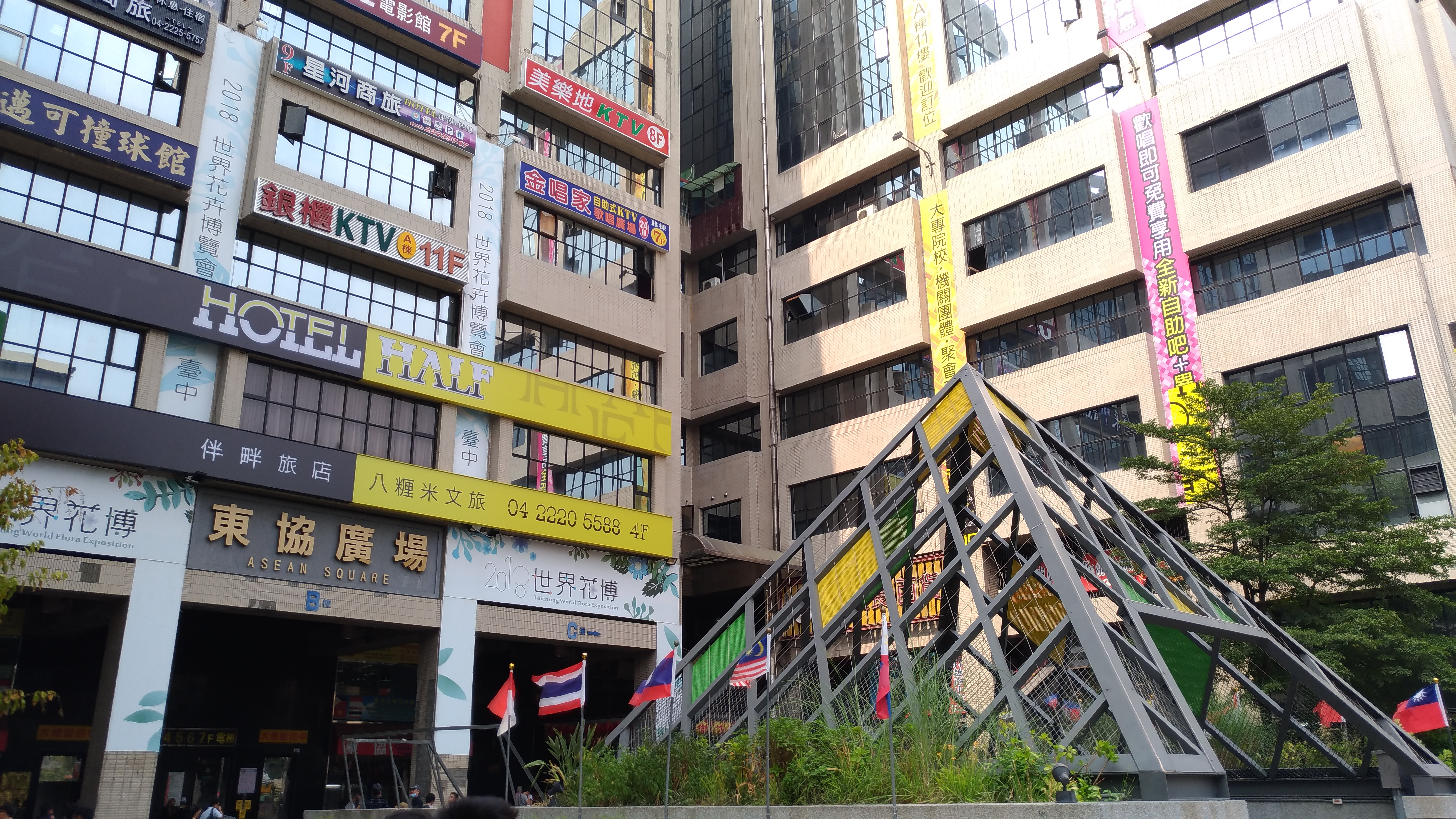 中文（台灣）: 臺中市中區東協廣場